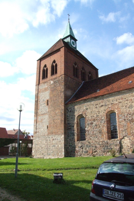 St. Georg Kirche in Arneburg